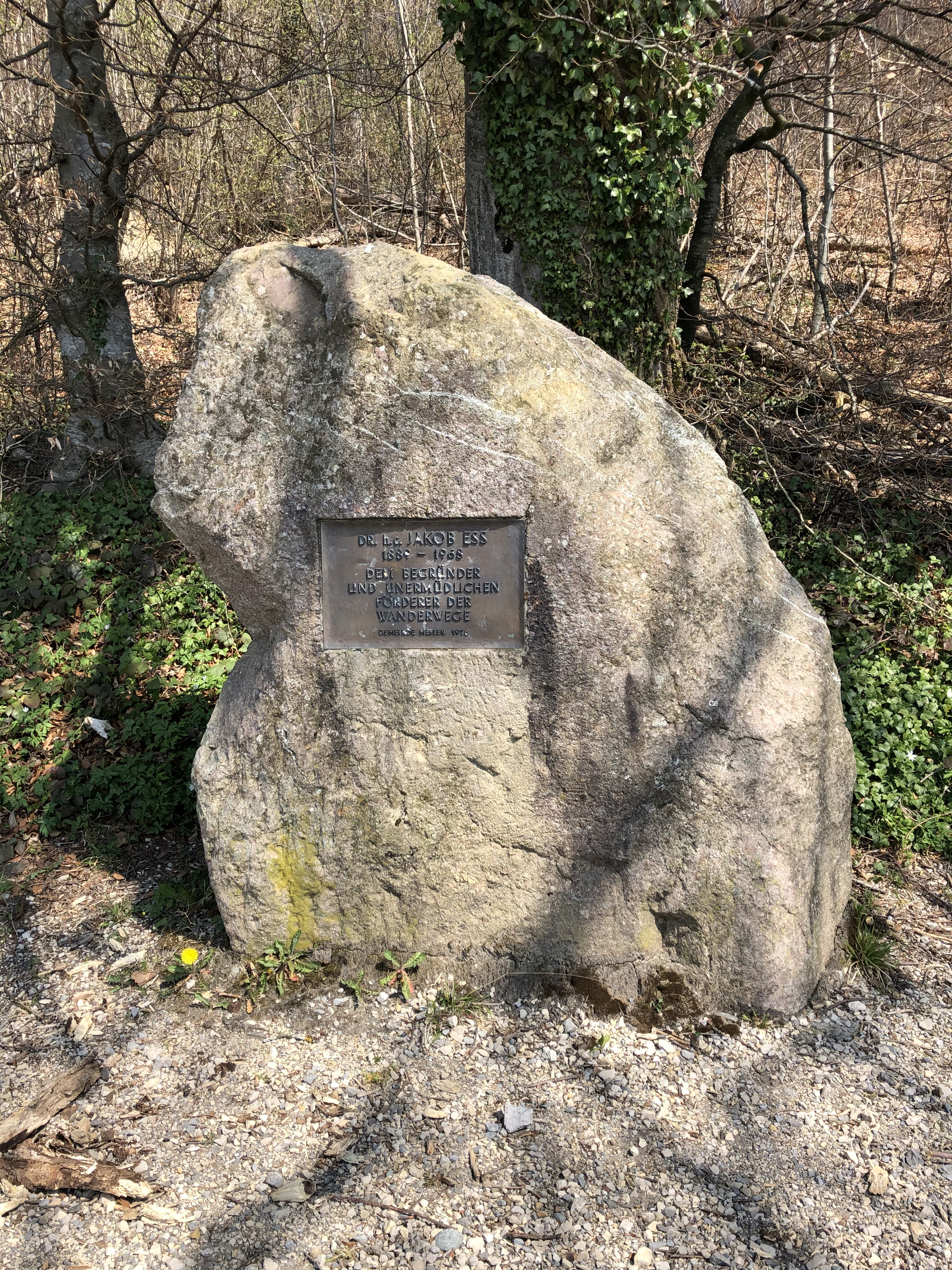 Gedenkstein beim Vorderen Pfannenstiel für Jakob Ess, Begründer der schweizerischen Wanderwege